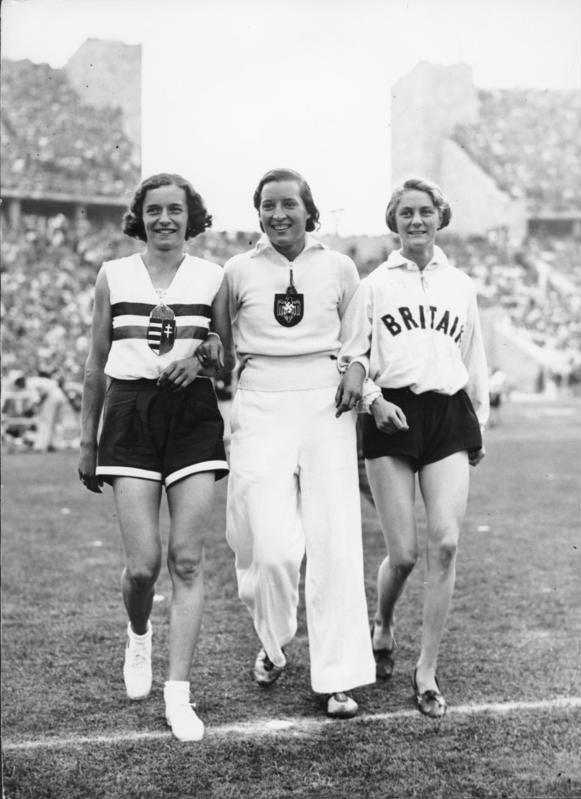 Berlin, Olympiade, Hochsprung der Damen Scherl Das sind die besten Hochspringerinnen der Welt Zwischen den Staffelkämpfen, die das Hauptprogramm des letzten Leichtathletiktages der XI. Olympischen Spiele am Sonntag bildeten, wurde mit dem Hochspringen der Frauen noch eine technische Uebung entschieden. Olympiasiegerin wurde dabei Ibolya Csak-Ungarn (links), Dorothy Odam-England errang die Silberne Medaille und die Deutsche Elfriede Kaun (Mitte) die Bronzene. Alle drei erreichten die Höhe von 1.60 m und erst der Stichkampf entschied den Sieg. Scherl Bilderdienst, Berlin 9.8.1936 Abgebildete Personen: Kaun, Elfriede: Hochspringerin, Deutschland Csak, Ibolya: Hochspringerin, Ungarn Odam, Dorothy: Hochspringerin, Großbritannien